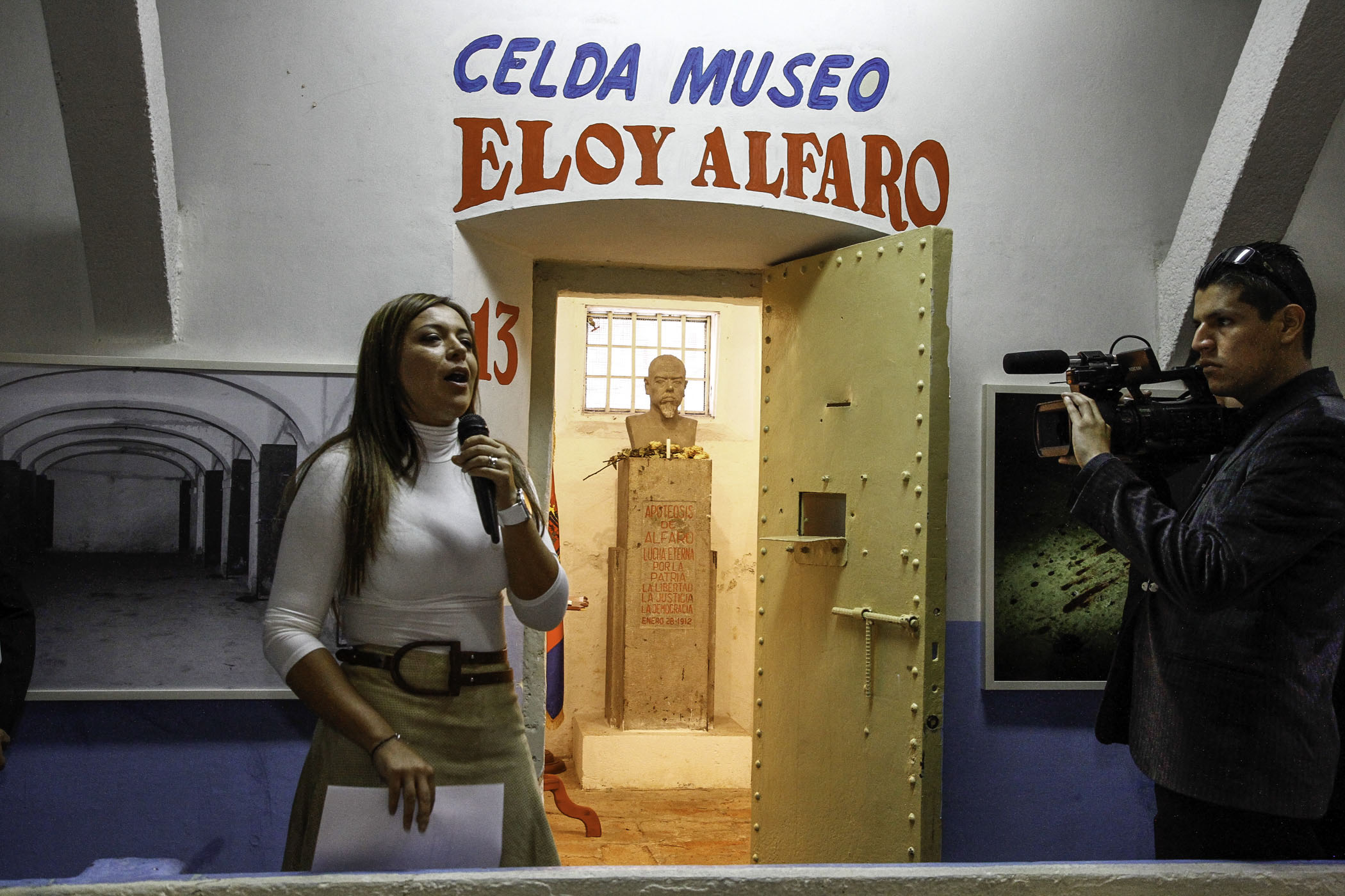 Quito, Ecuador, 20 dic (ANDES).- El Ministerio de Justicia, Derechos Humanos y Cultos presentó la exposición fotográfica "Espacios Verdes" cuyo escenario es el ex-Penal García Moreno. Esta exposición devela lo que dejaron las personas privadas de la libertad antes del cierre de este recinto carcelario. Foto: Micaela Ayala V./ANDES